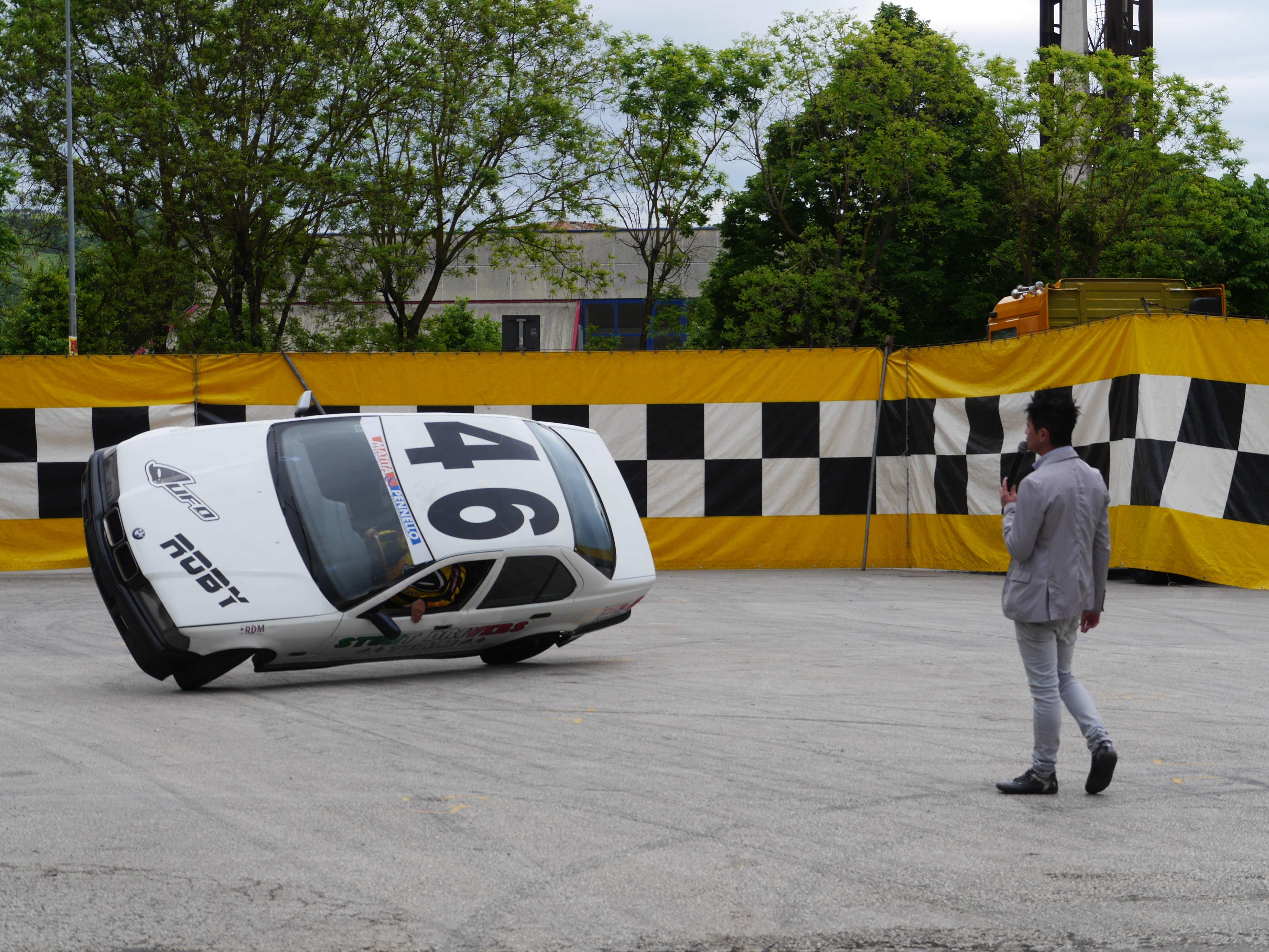 This photo was taken with Panasonic Lumix DMC-GH3 camera, thanks to Panasonic.You can see all photographs in category: Taken with Panasonic Lumix DMC-GH3.